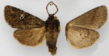 Tricholita knudsoni male